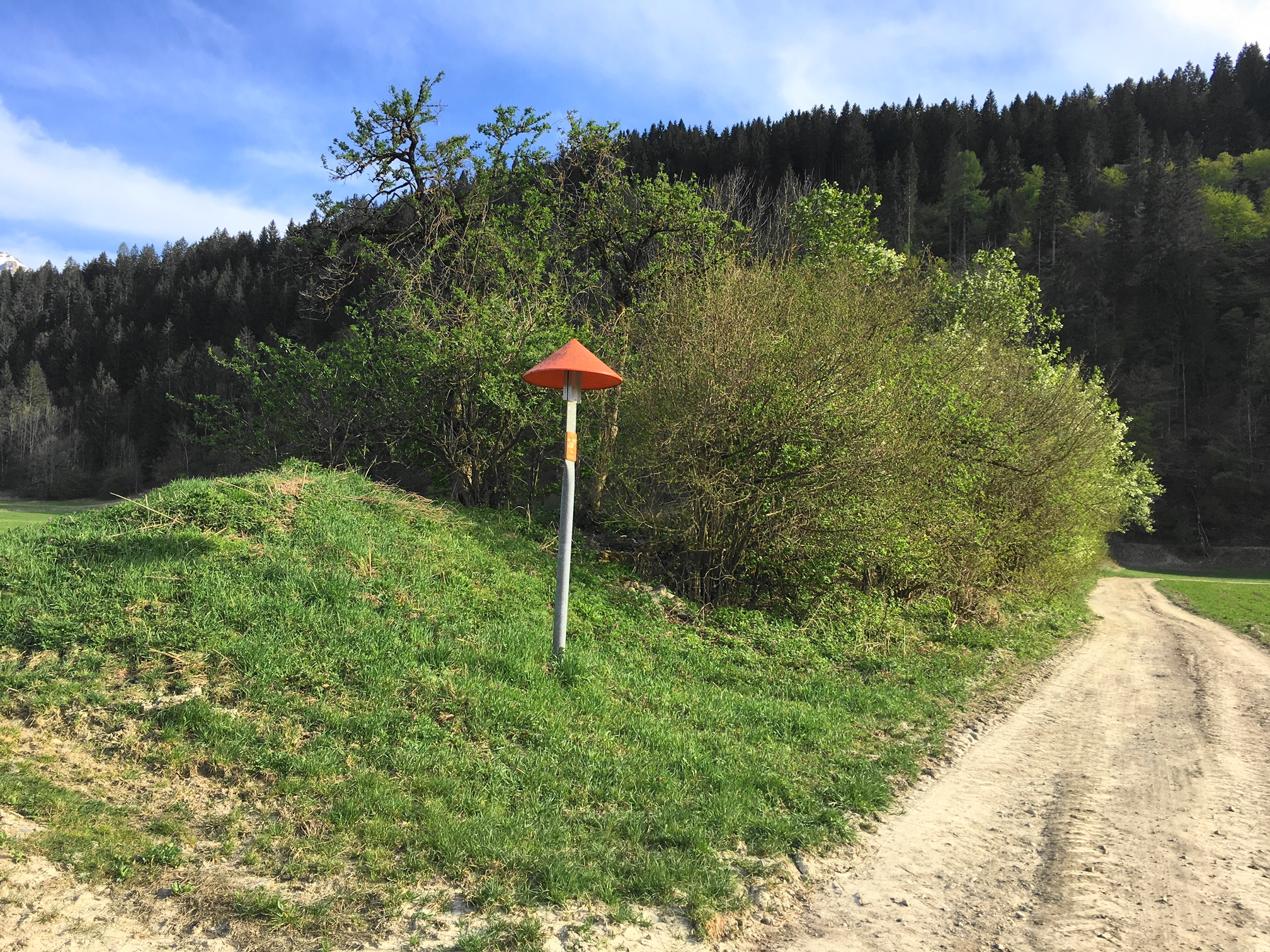 Römische Talsperre Hadnmauer